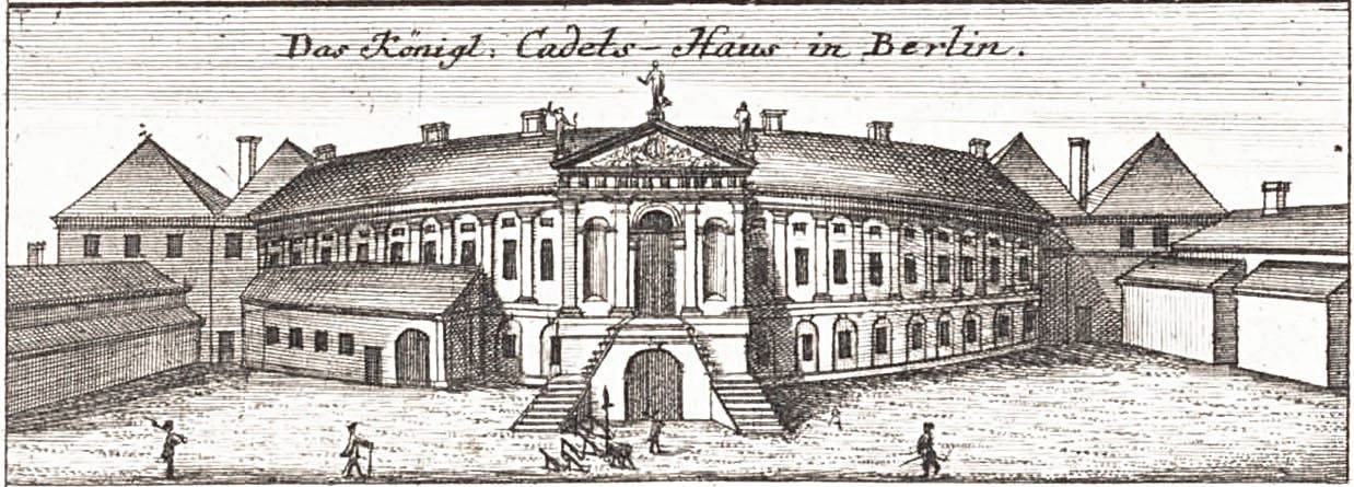 Ansicht des alten Cadetten-Hauses in Berlin